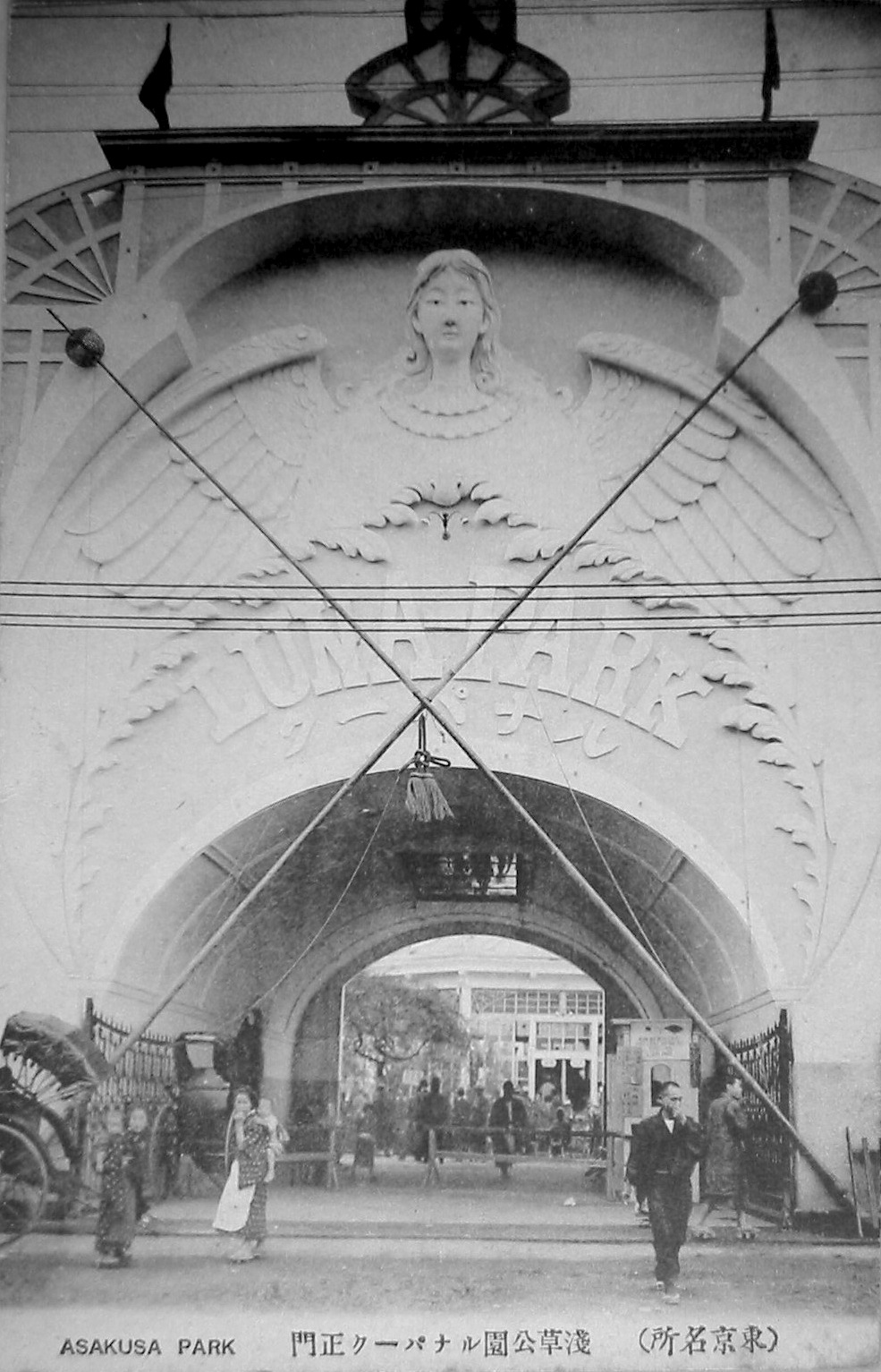 東京名所）浅草公園ルナパーク正門 (Luna Park in Asakusa, main Gate)